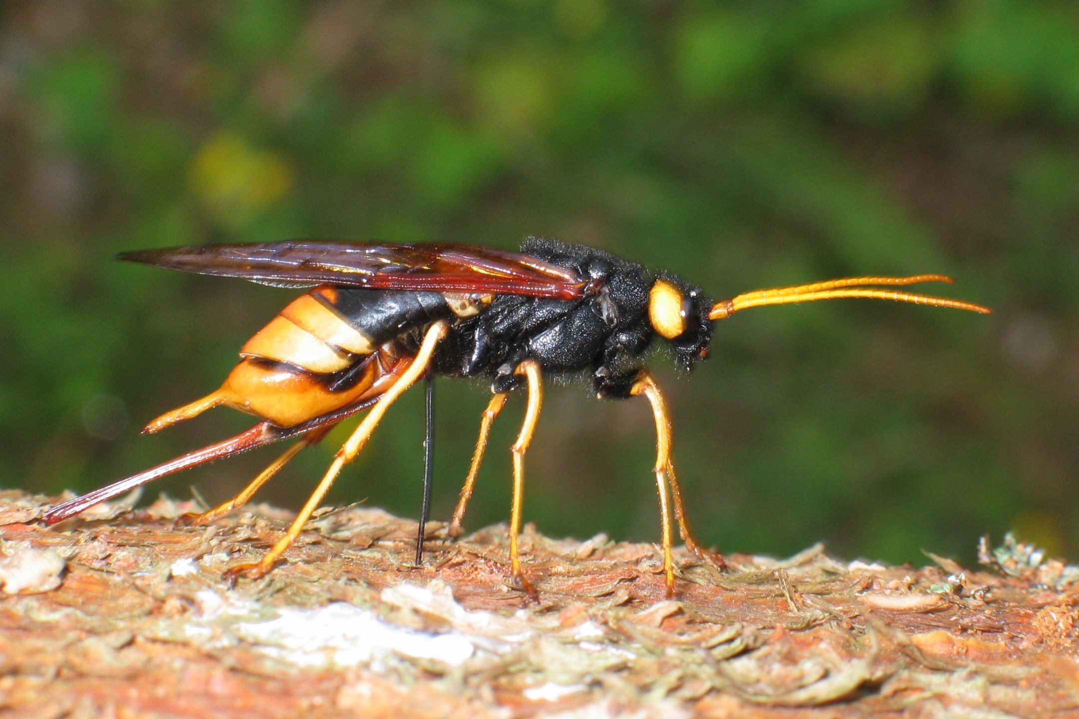 Riesenholzwespe (Urocerus gigas)